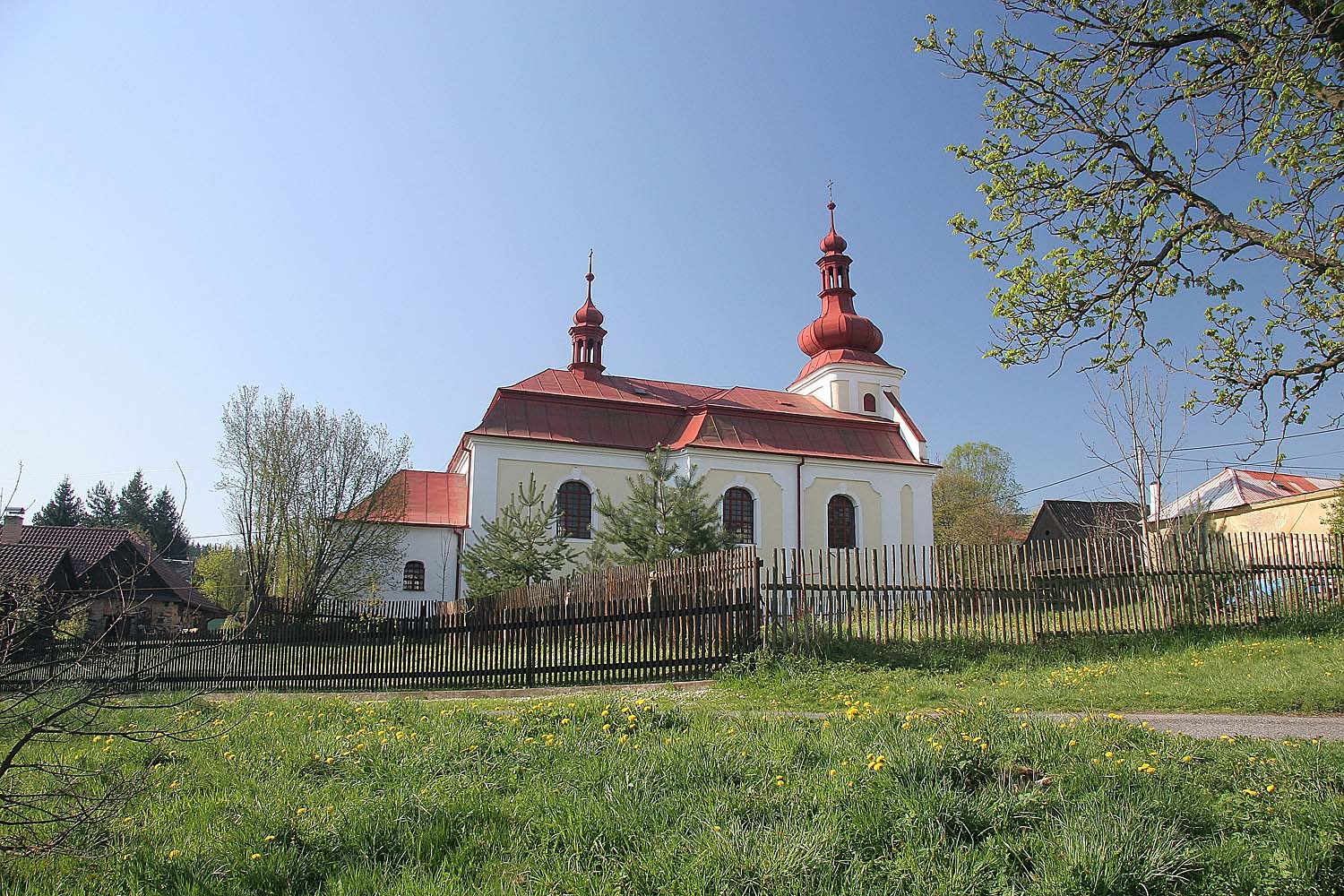 Kostel svatého Václava v obci Krásné, district Žďár nad Sázavou